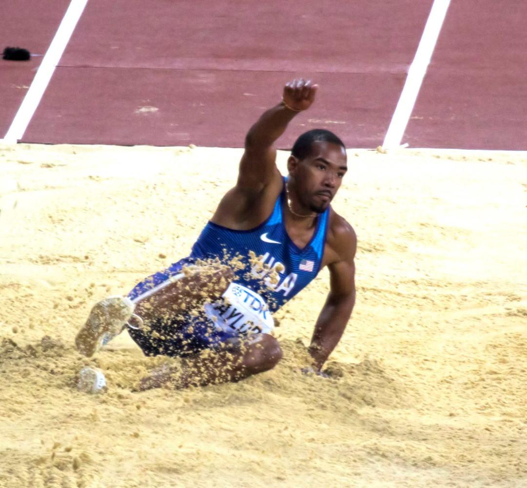 d6_6 hinkstap taylor